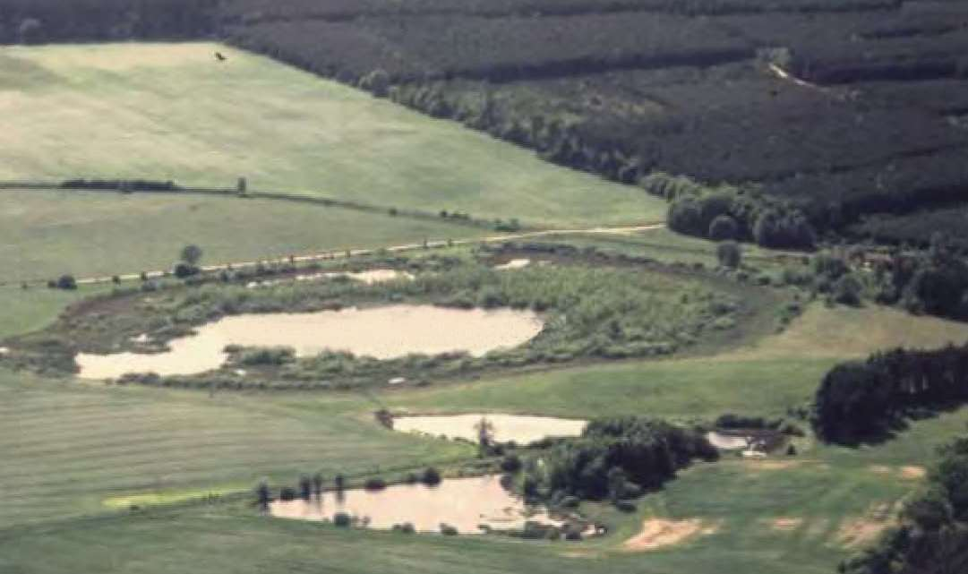 Luftbild vom Mittelsee bei Langwitz. Blick von Nordost.